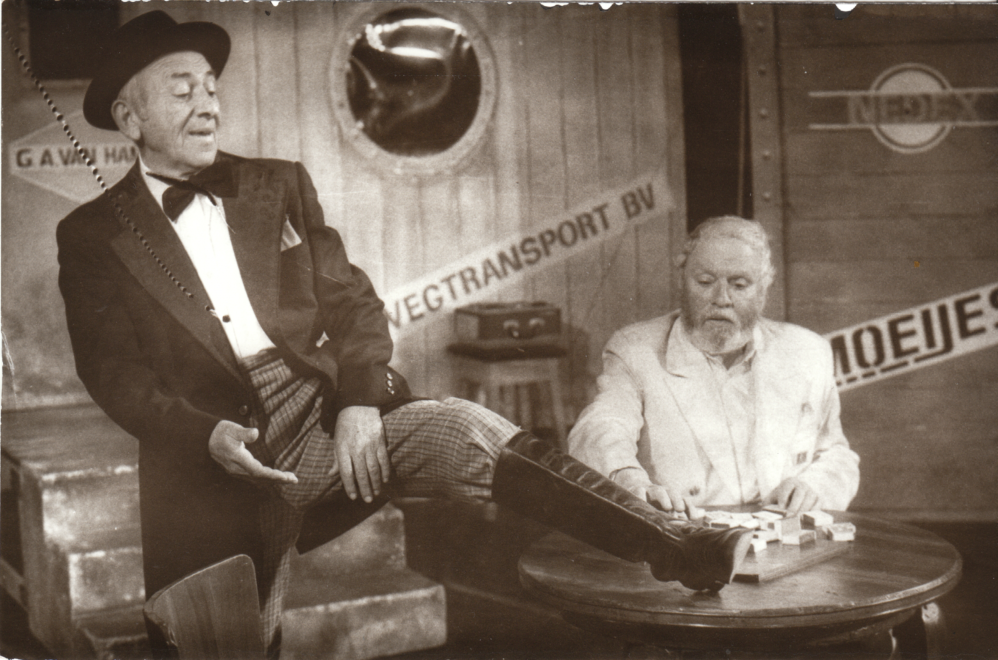 „Нощни пазачи“ - режисьор Петър Александров Юбилеен спектакъл 60-годишнина на Минко Минков (Гаврилис) и Цако Дачев (Пипис)